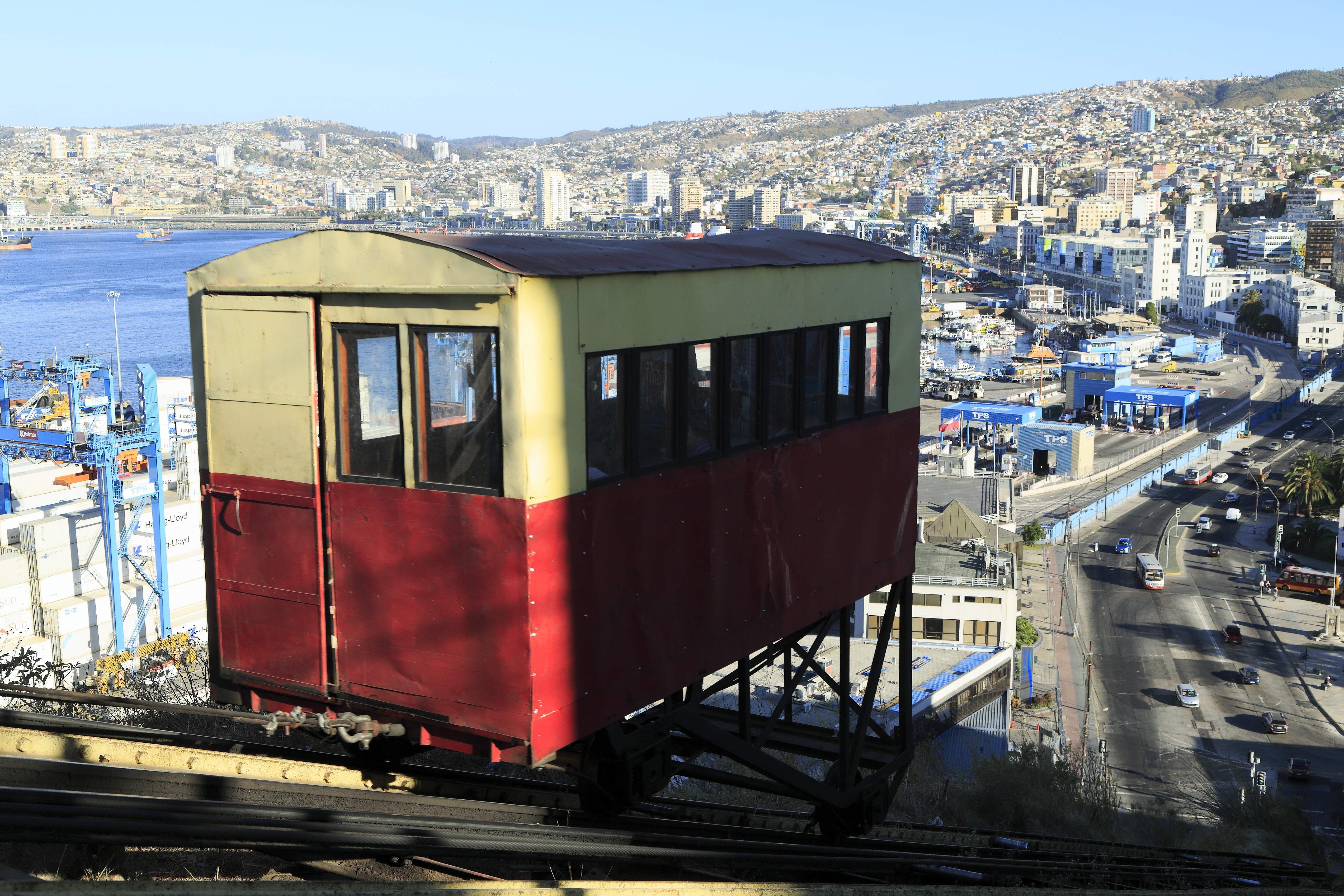 Die bergseitigen Einstiege sind wegen des Platzbedarfs der Fördermaschnine außermittig angeordnet, der Wagen läuft auf dem talwärts gesehen linken Gleis.